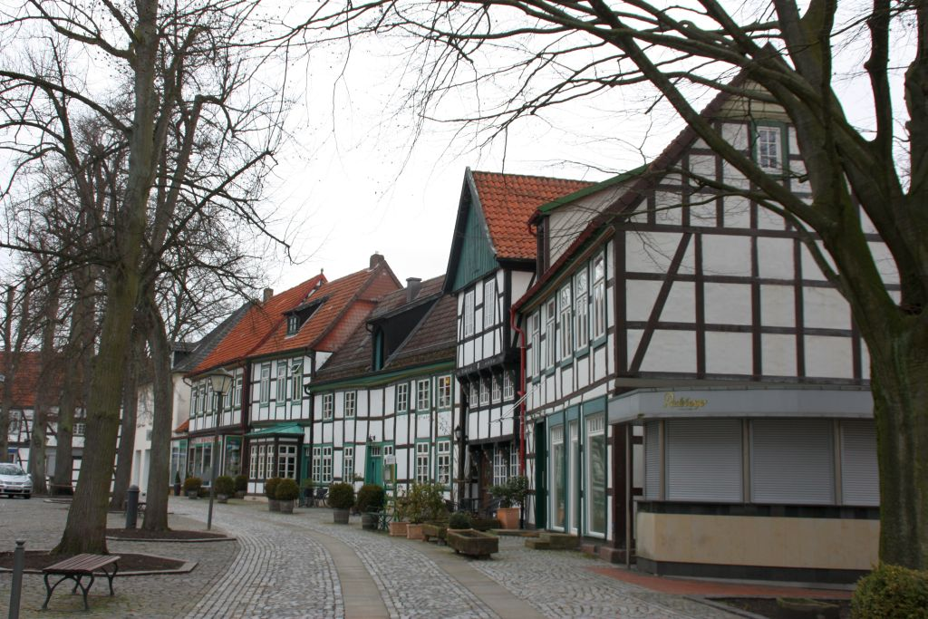 Bad Essen am Marktplatz